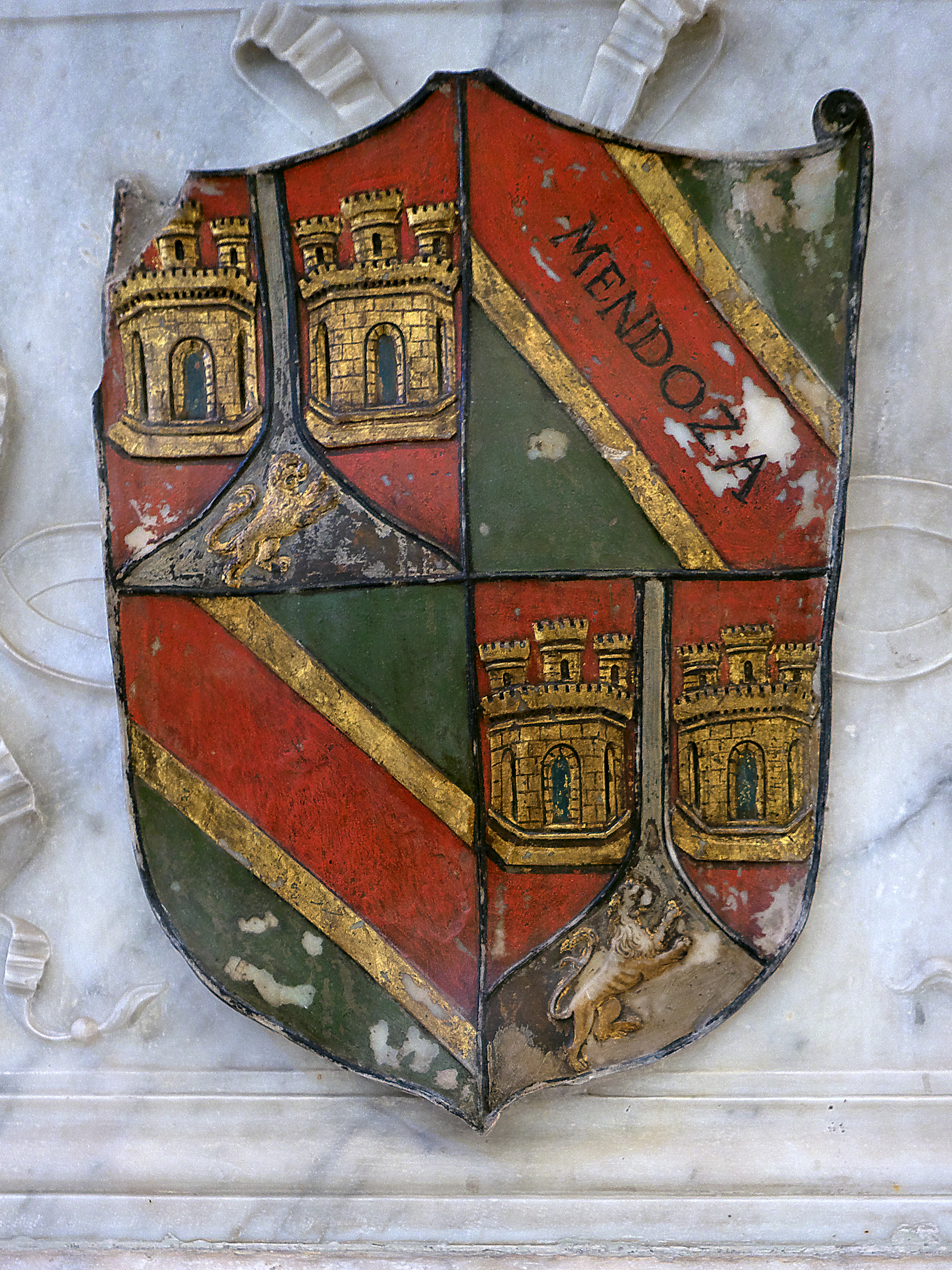 Capilla del Capítulo. Escudo en el monumento funerario de Pedro Enríquez de Quiñones, hijo de Fadrique Enríquez de Mendoza (†1473)